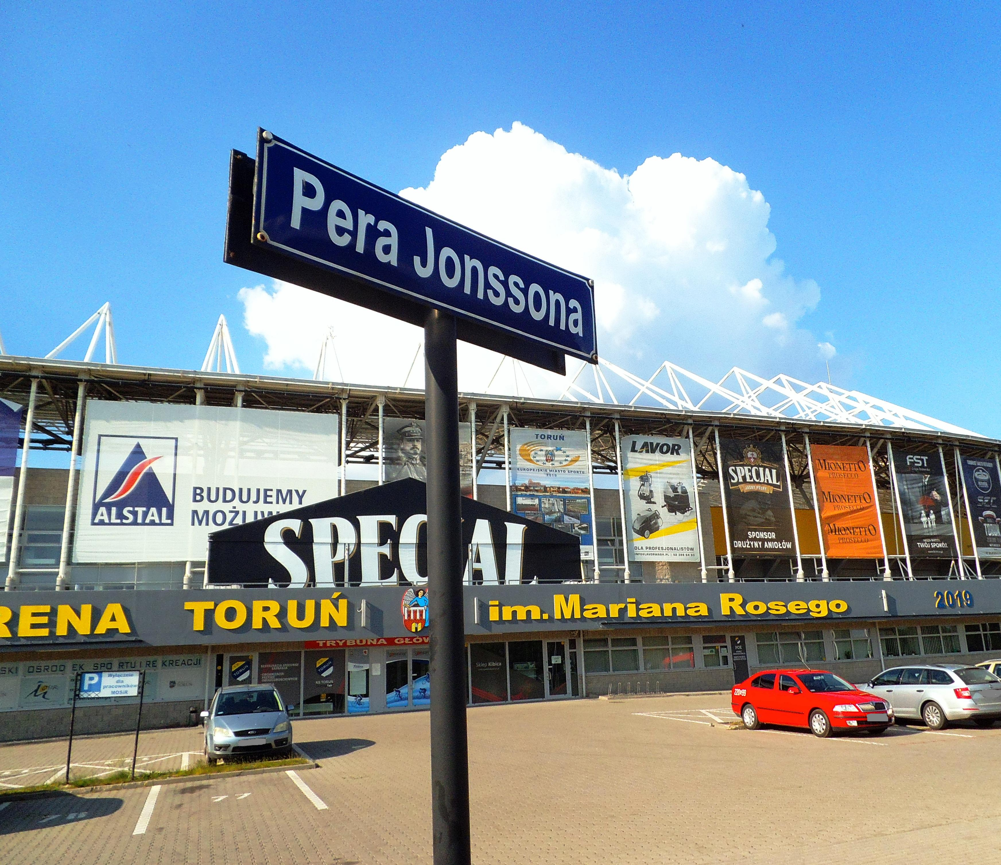 Ulica Pera Jonssona w Toruniu